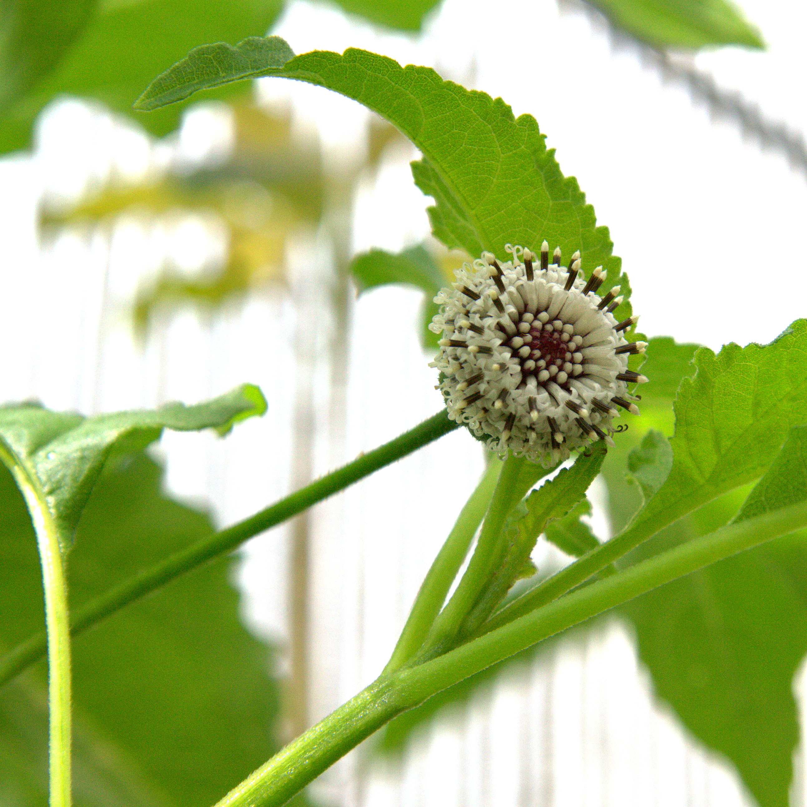 Scalesia divisa